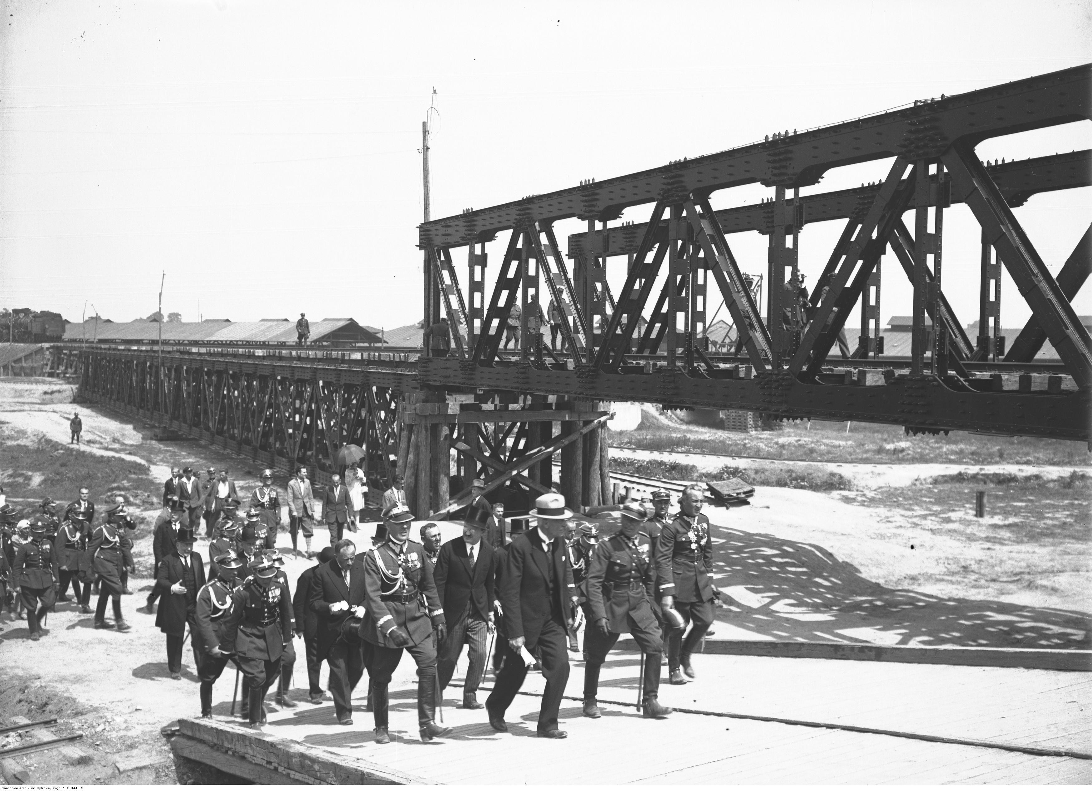 Most kolejowy na Narwi budowany przez 1 i 2 Pułk Saperów Kolejowych. Prezydent RP Ignacy Mościcki (w jasnym kapeluszu) zwiedza teren budowy. Widoczny także m.in.: gen. Gustaw Orlicz-Dreszer. Koncern Ilustrowany Kurier Codzienny - Archiwum Ilustracji. Sygnatura: 1-G-3448-5